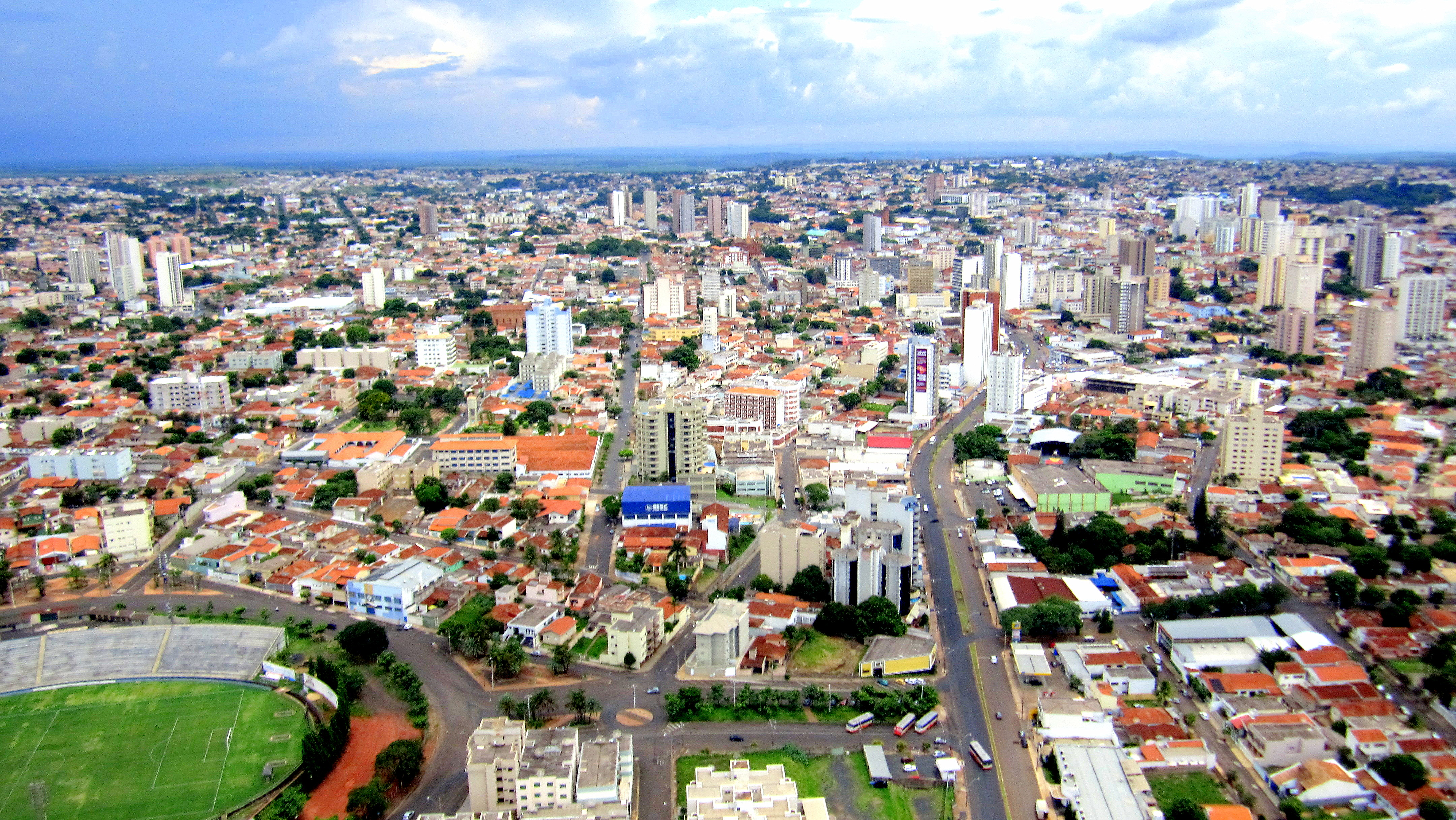 Foto aerea de Uberaba feita pelo meu hexacoptero.